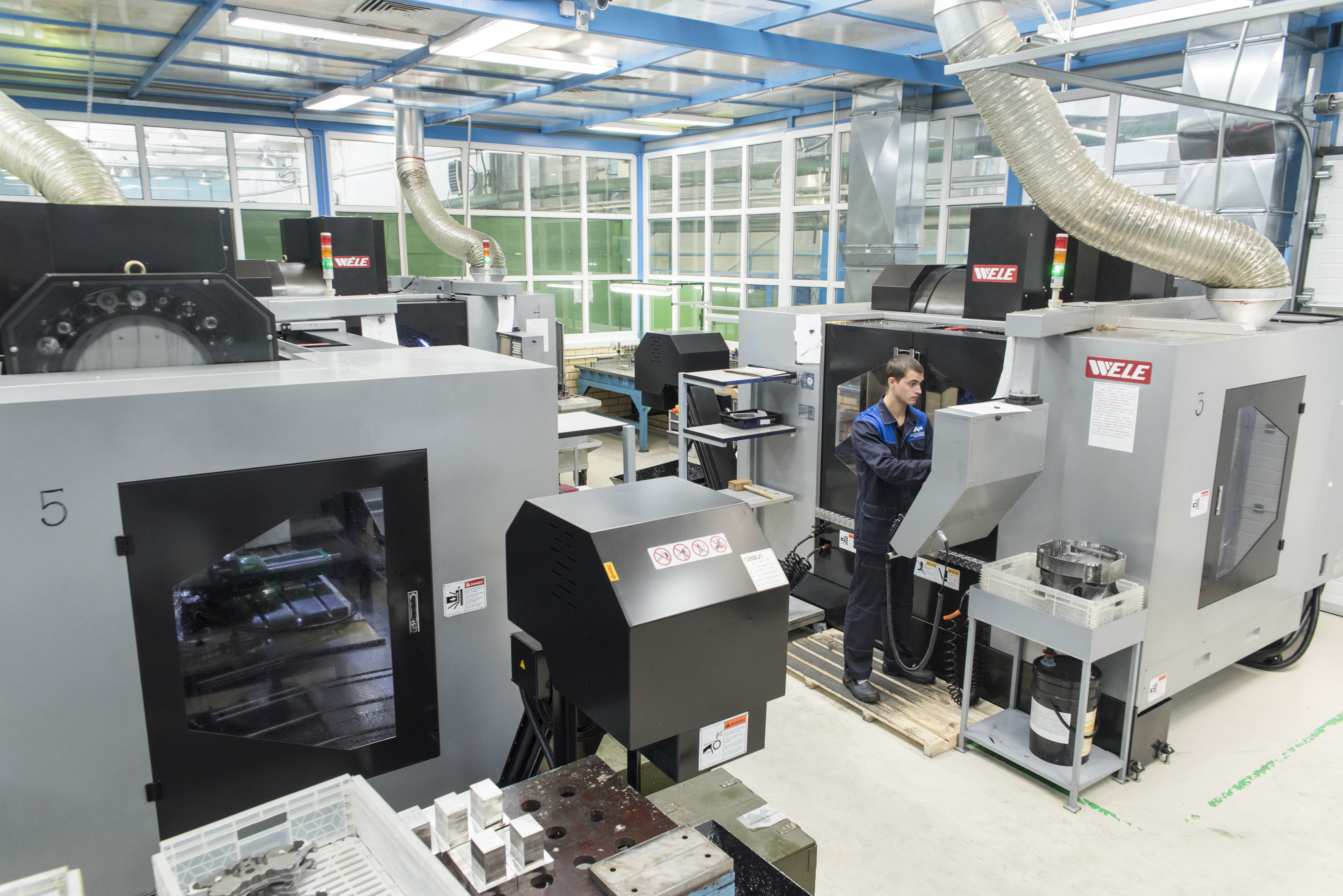 В цехе предприятия